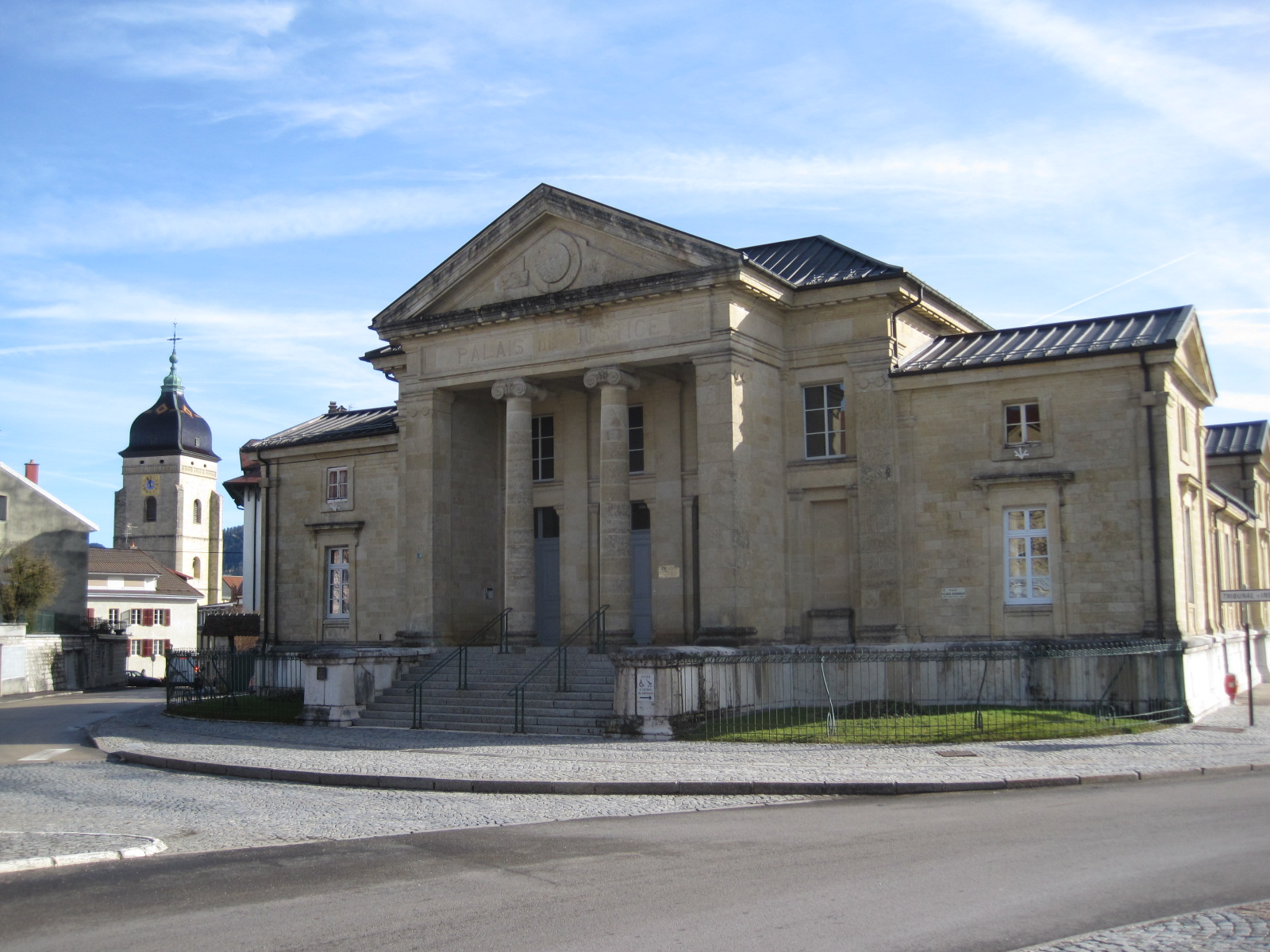 Tribunal de Pontarlier, et Église Saint-Bénigne de Pontarlier